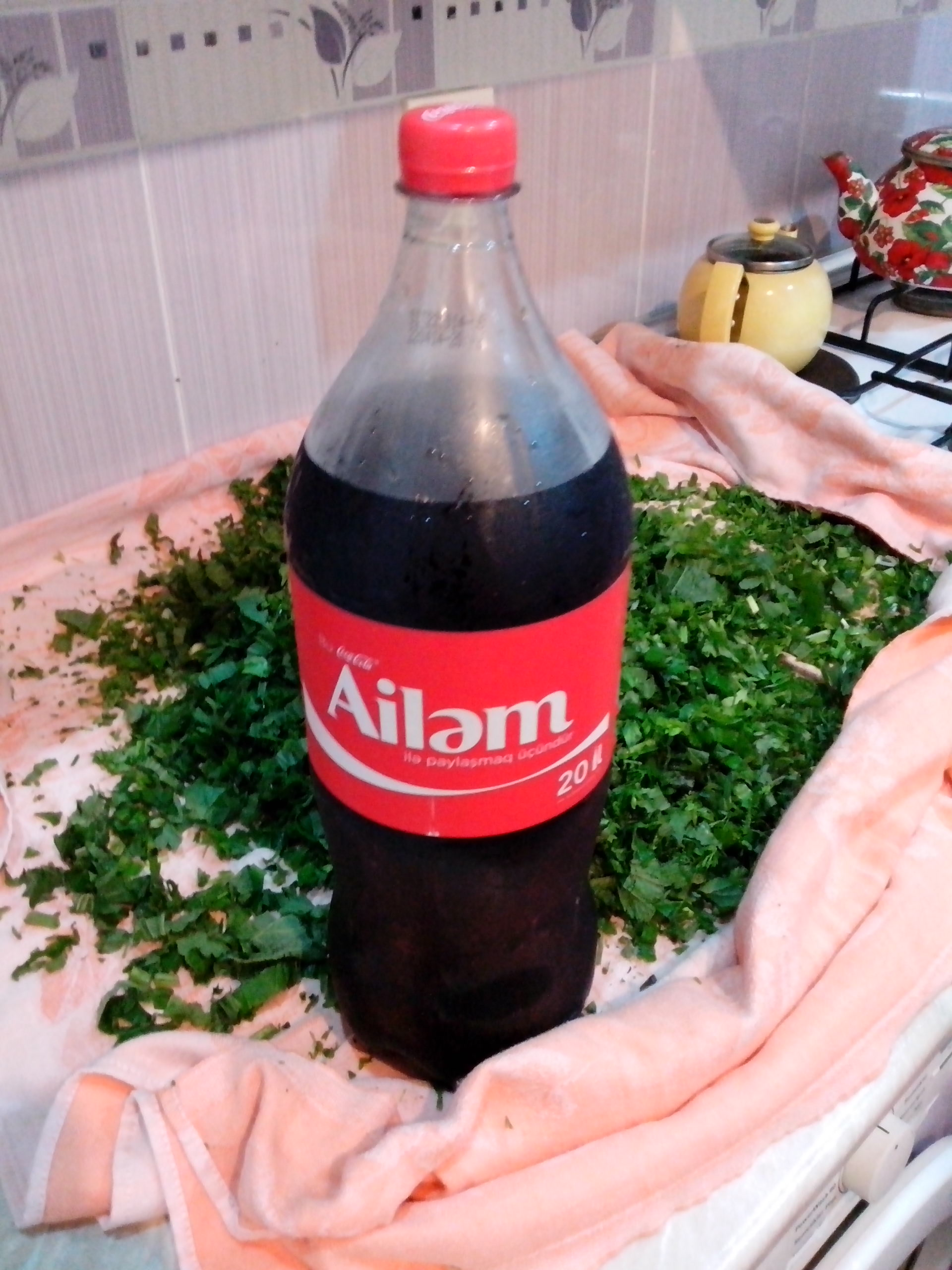 Koka-Kola Azərbaycanda - 20 il (Ailəm)